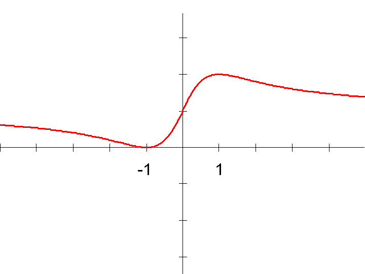 Az f(x) = (1+x)2/(1+x2) függvény grafikus ábrázolása